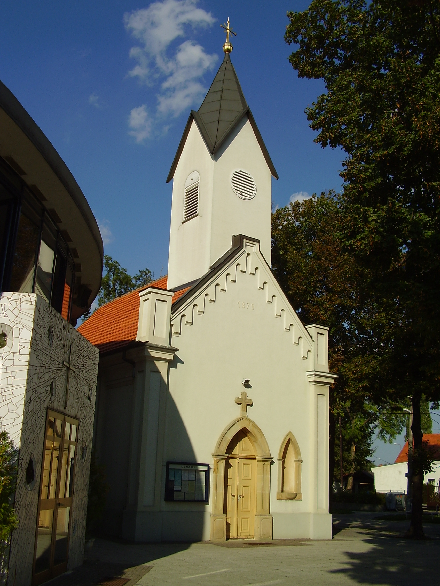 Bratislava